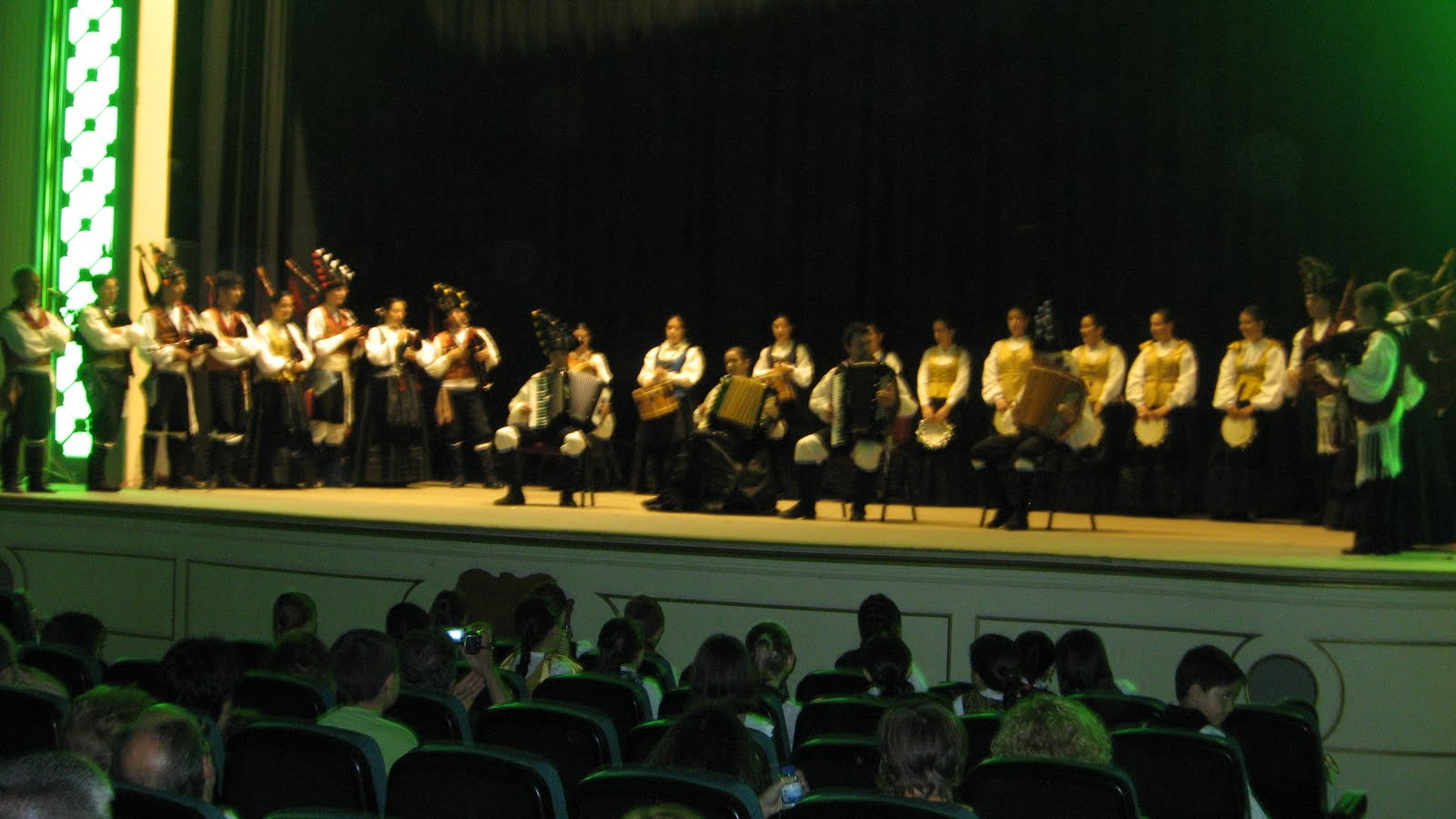 Fotografía tomada na actuación de fin de curso de 2011, no Centro Cultural Avenida de A Rúa